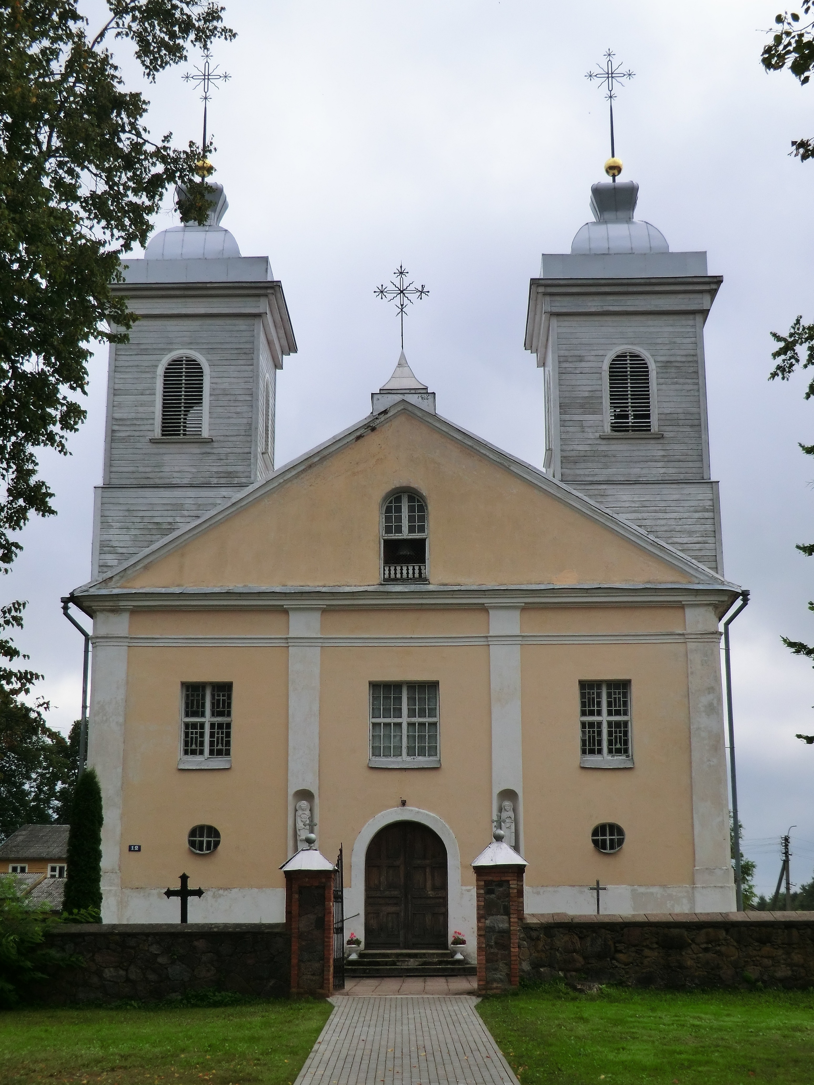 костёл, Панделис